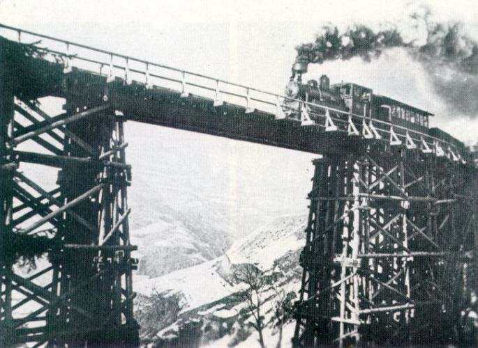 autore: ignoto provenienza: - grazie a Mauro Bottegal descrizione: Treno della ferrovia val gardena data: ignota, ma precedente il 1964 Licenza d'uso: Pubblico dominio